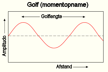 Golflengte x